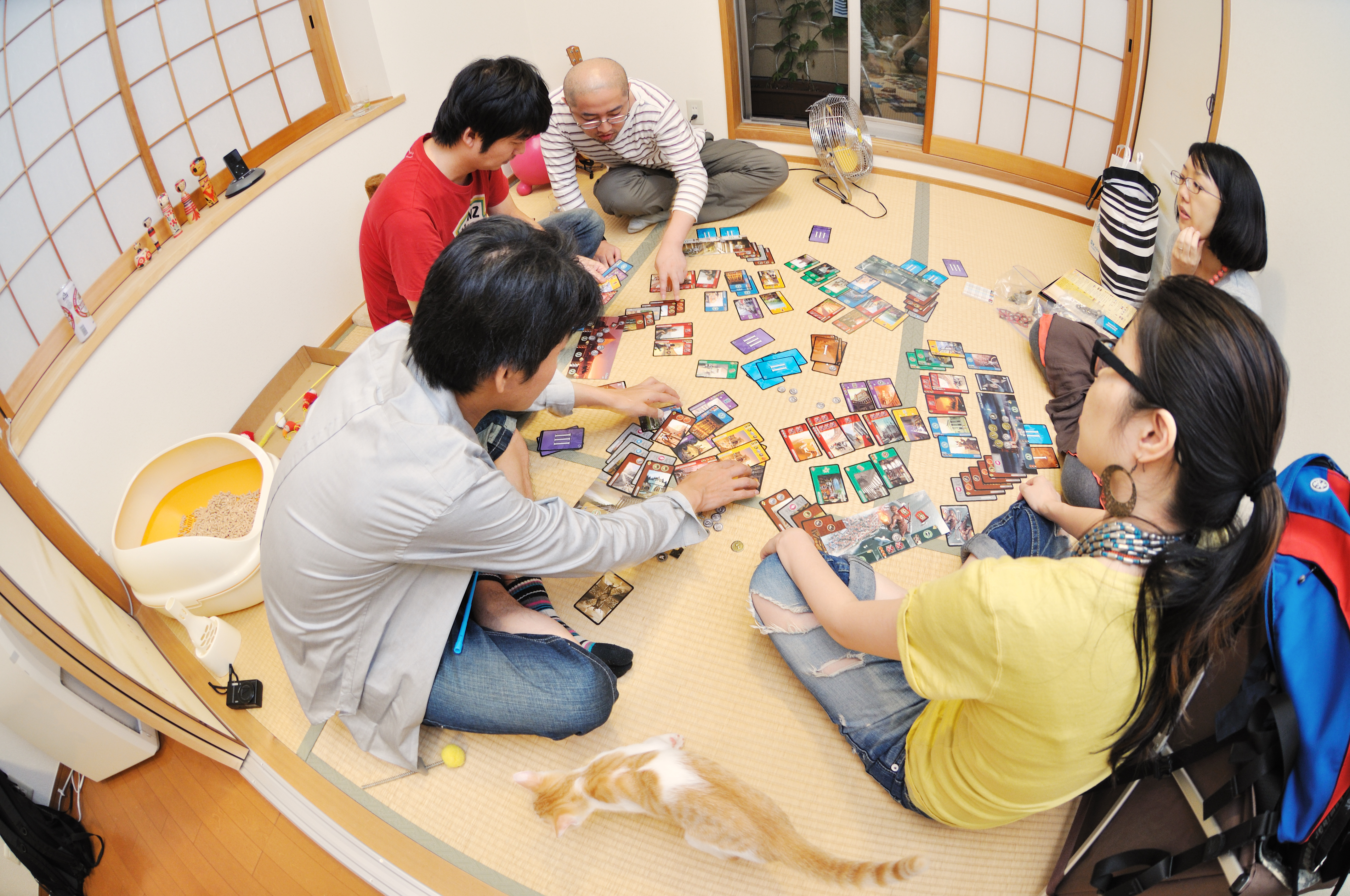 Une partie du jeu de société 7wonders